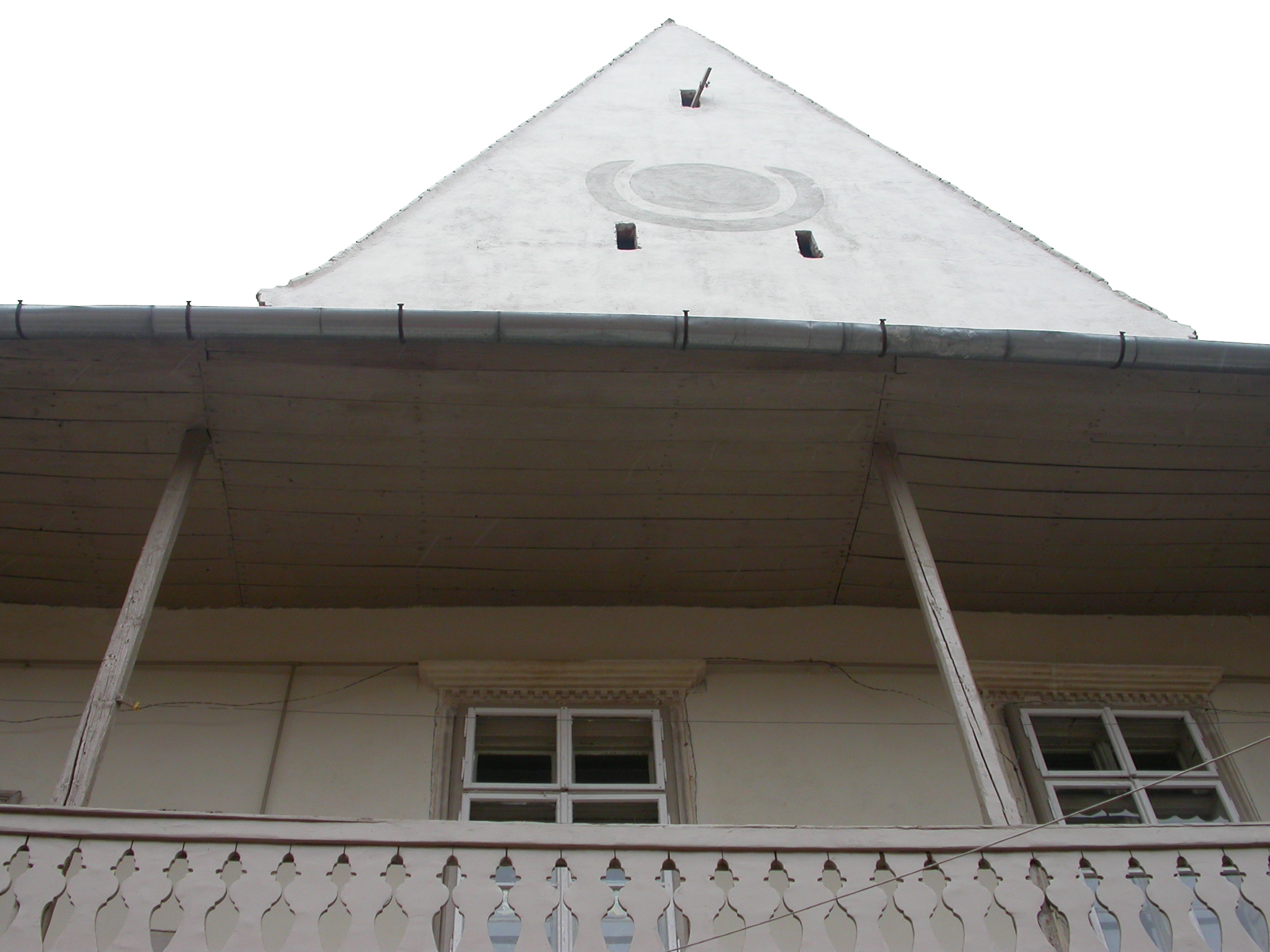 Casa Haller, azi locuințe și spațiu comercial, sec. XV - XVI, sec. XX